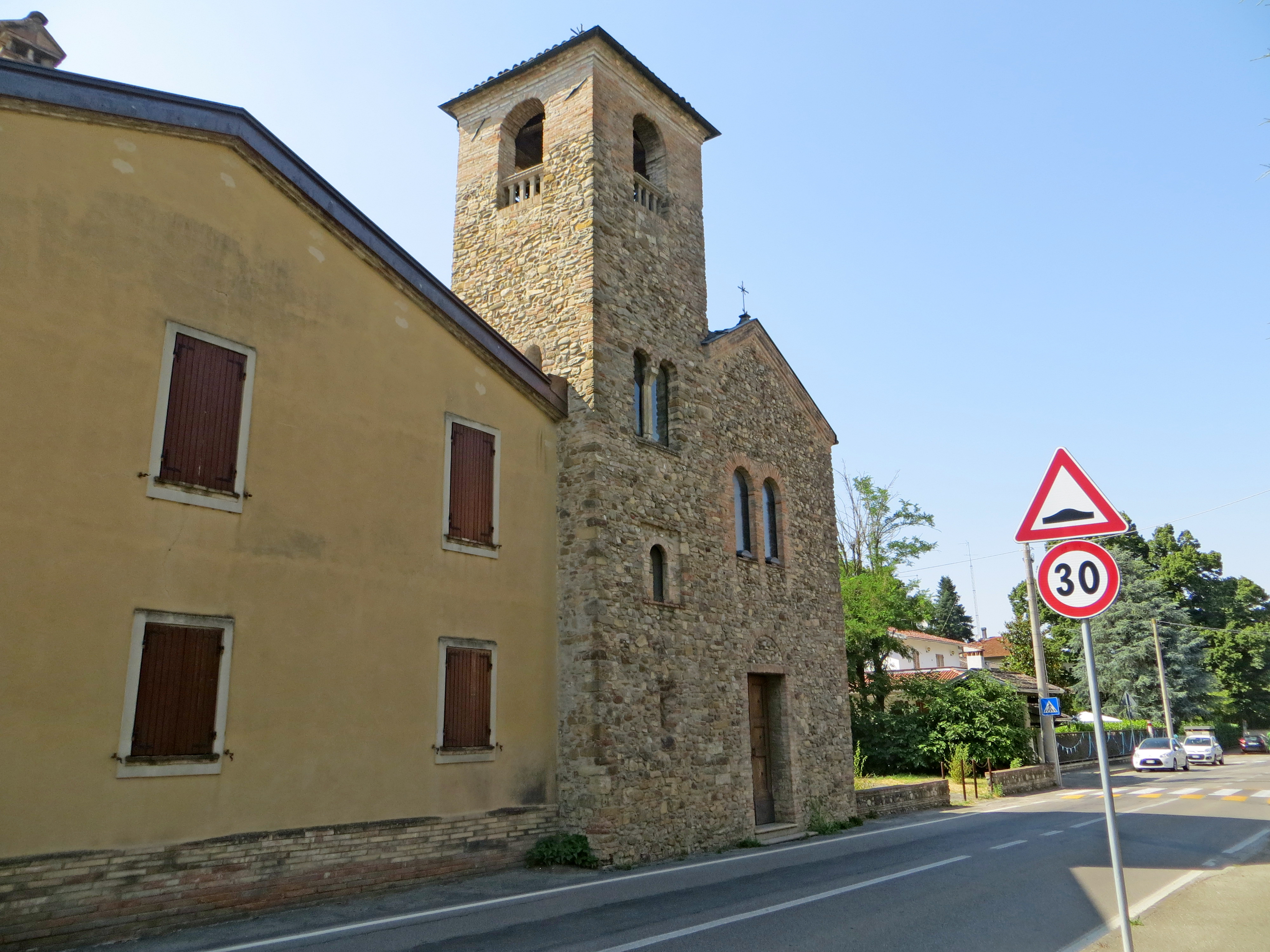 Chiesa di San Lorenzo (Alberi, Parma) - facciata